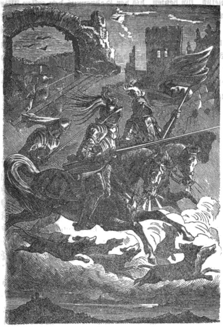 Die Sage vom Ritter von Rodenstein und Schnellart als Herold des Kriegs und Friedens, Ottmar Schönhuth, Riecker, S. 15